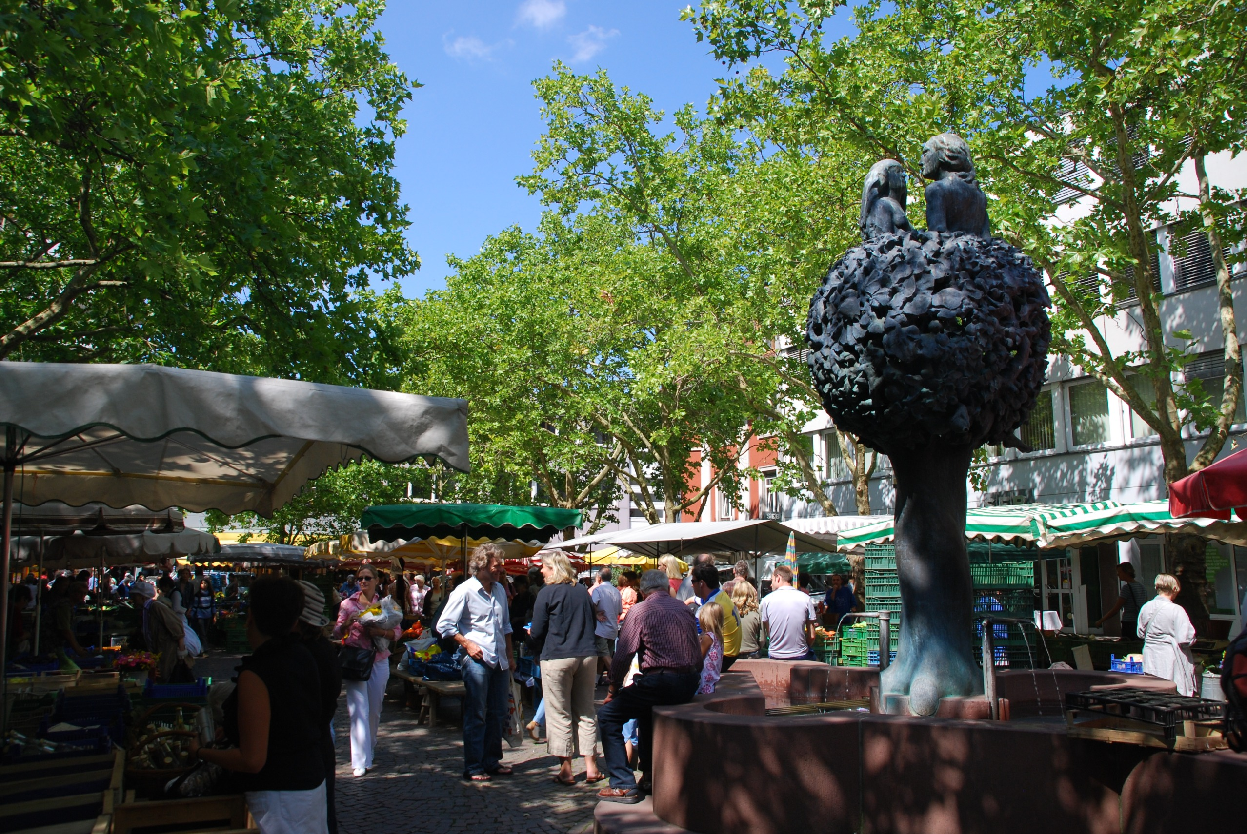 Markt in Lörrach (hier: an einem Samstag)